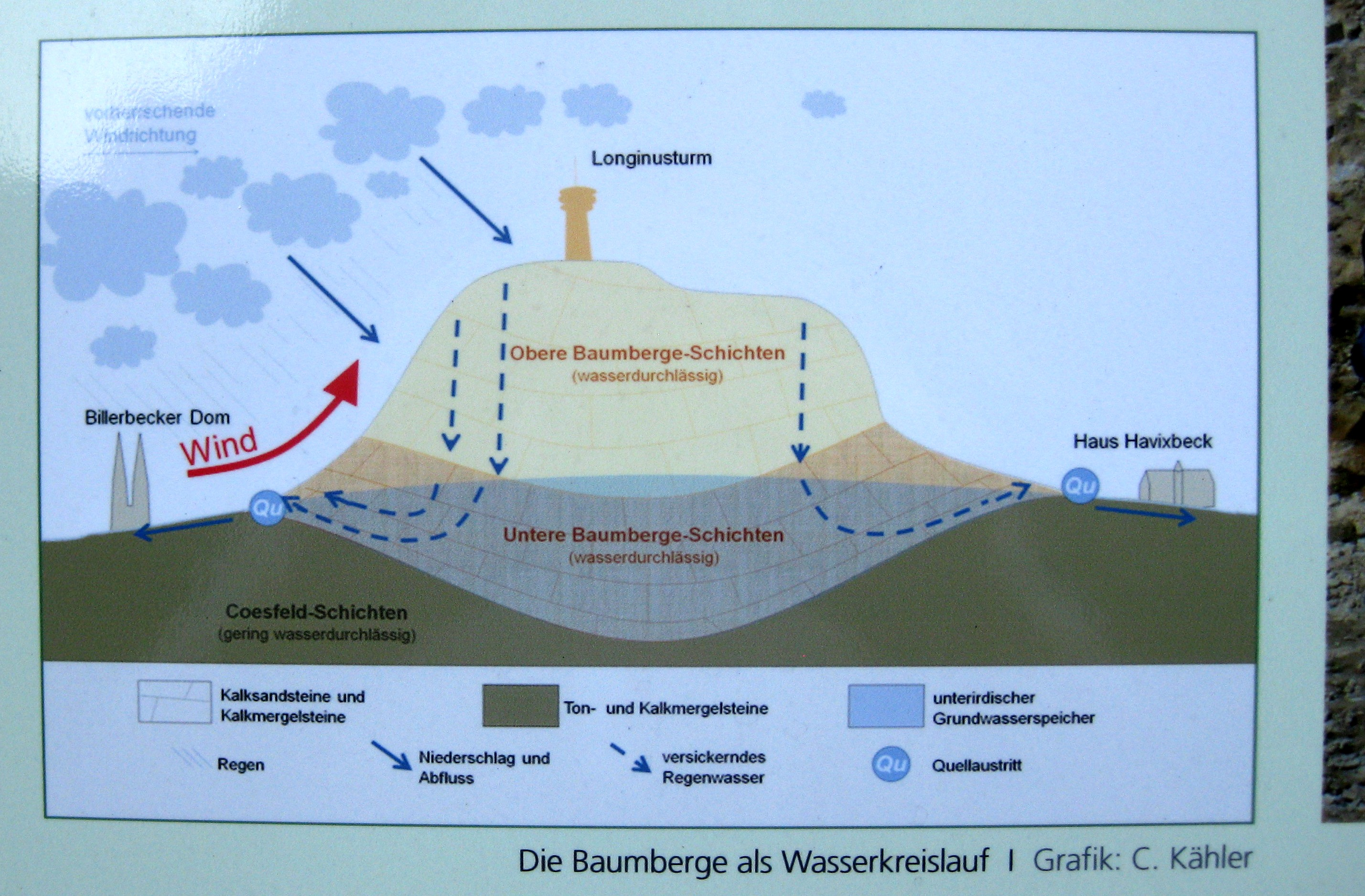 Wasserkreislauf in den Baumbergen bei Havixbeck im Münsterland / Infotafel am Havixbecker Sandsteinweg